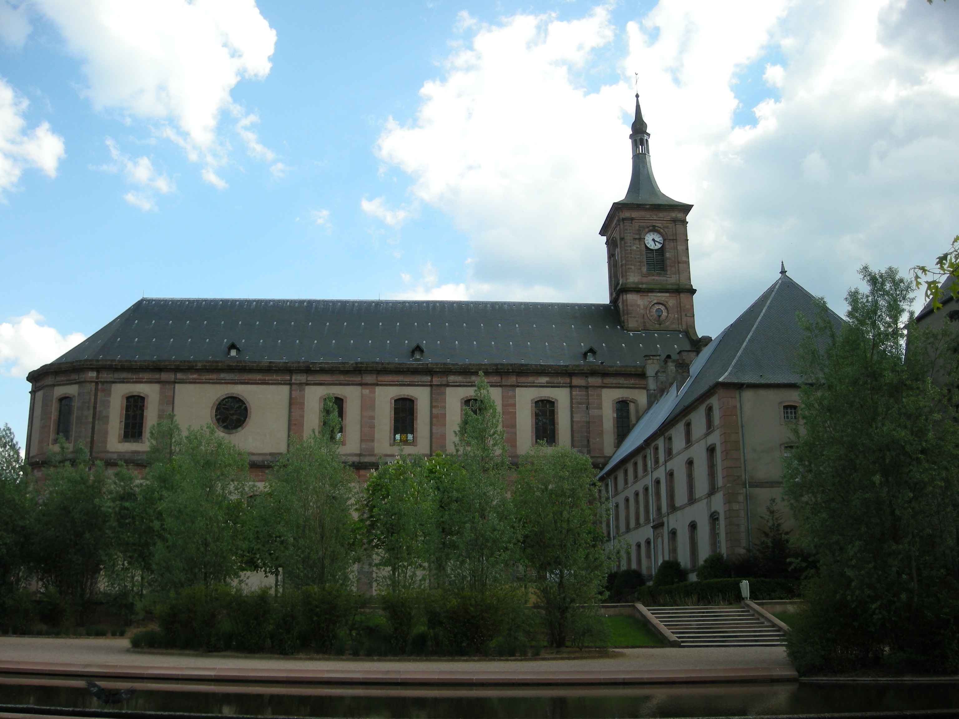 L'église abbatiale de Moyenmoutier (Vosges)